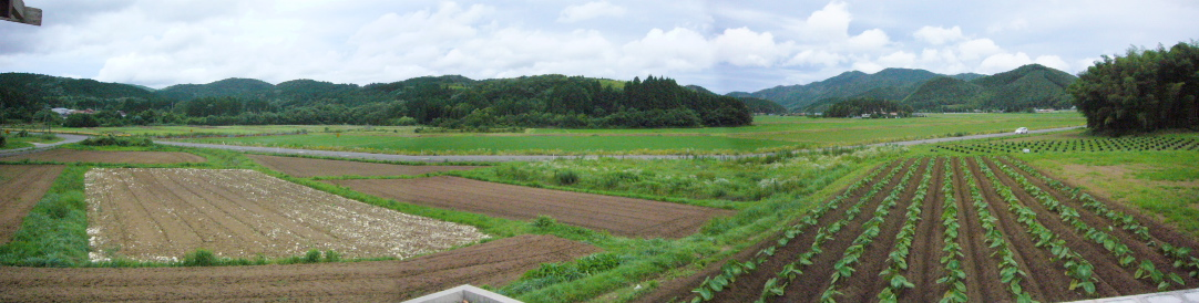 山口県美祢市赤郷のポリエ風景